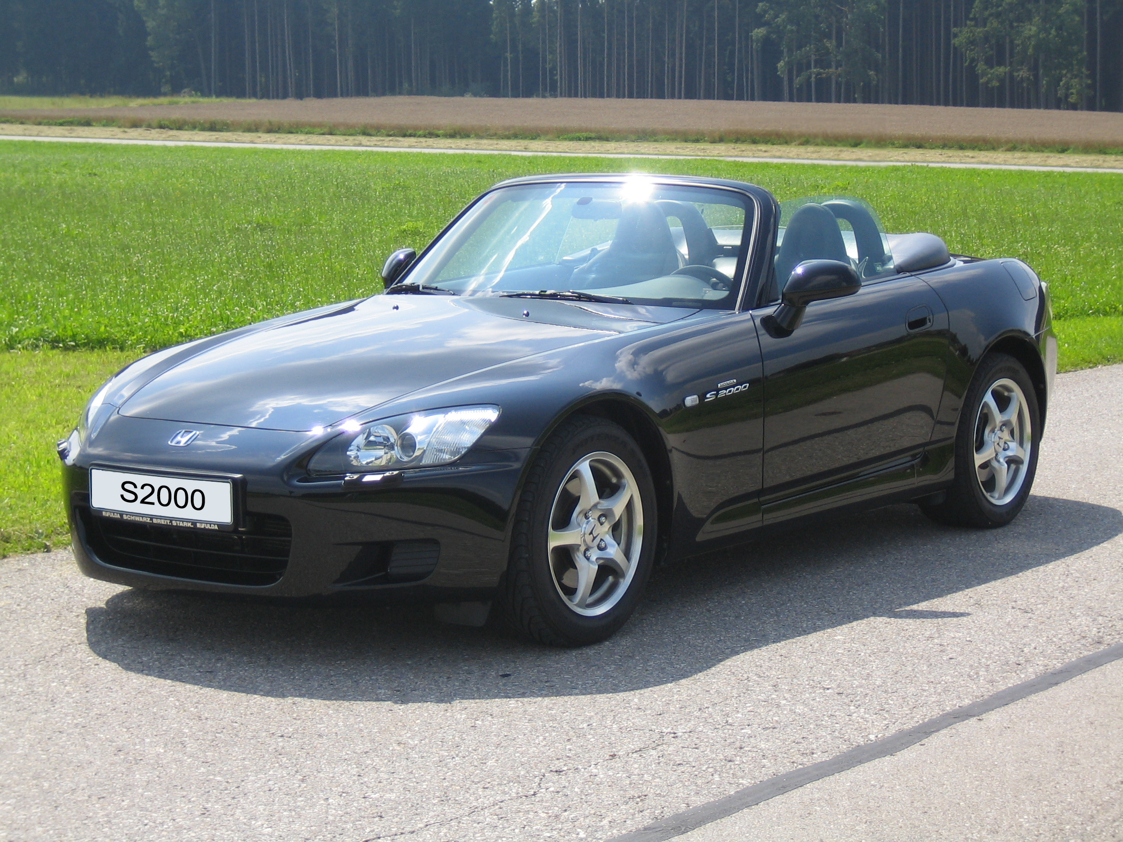 Selfmade Photo eines Honda S2000. Freie Lizenz zur freien Verwendung.